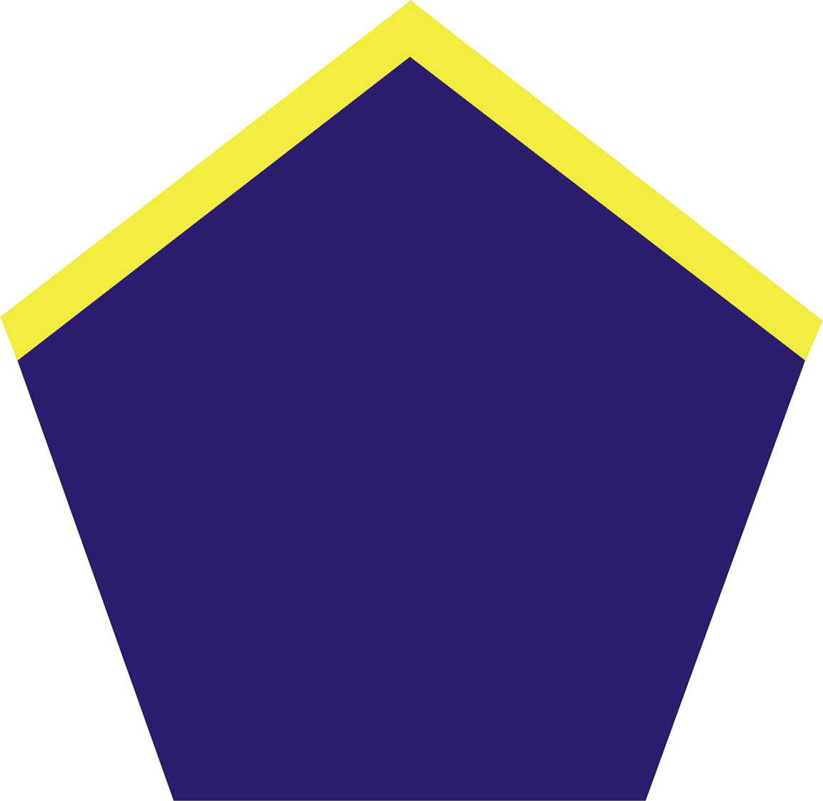 Patka piechoty na kołnierz kurtki oficerskiej, stosowana w Wojsku Polskim we Francji od 1940